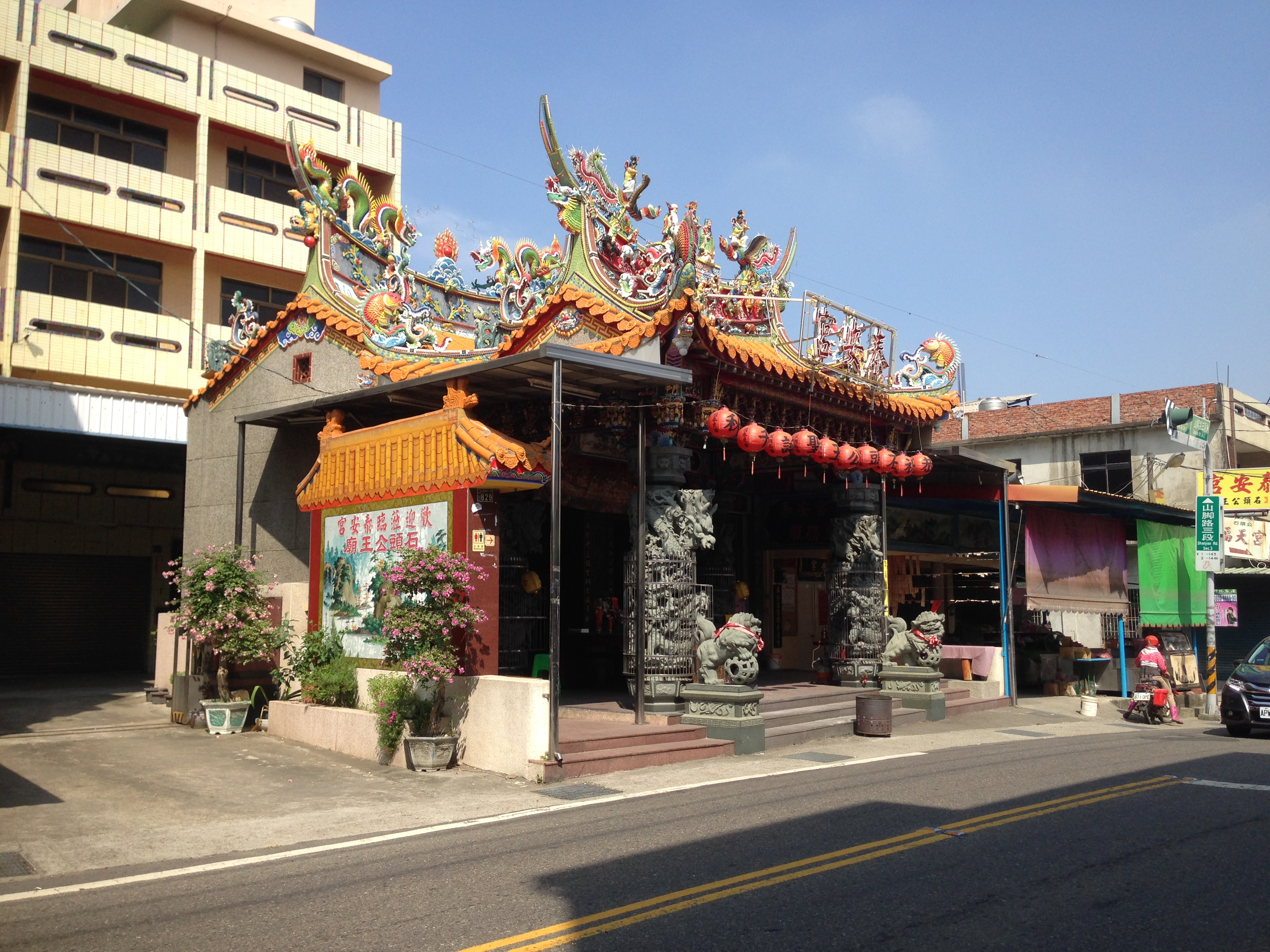 中文（台灣）: 社頭泰安宮側照